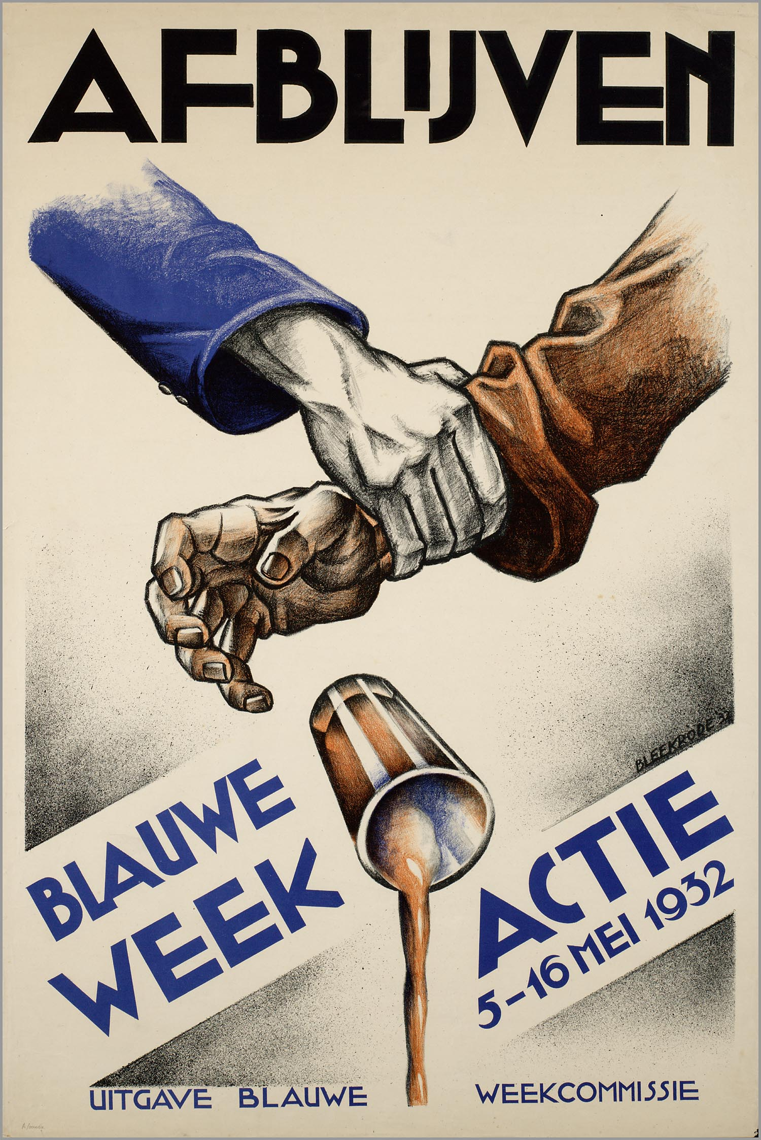 Afblijven. Blauwe week Actie 5-16 mei 1932.